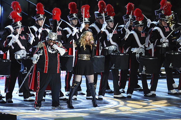 2012-02-05 Super Bowl Drumline Halftime Show